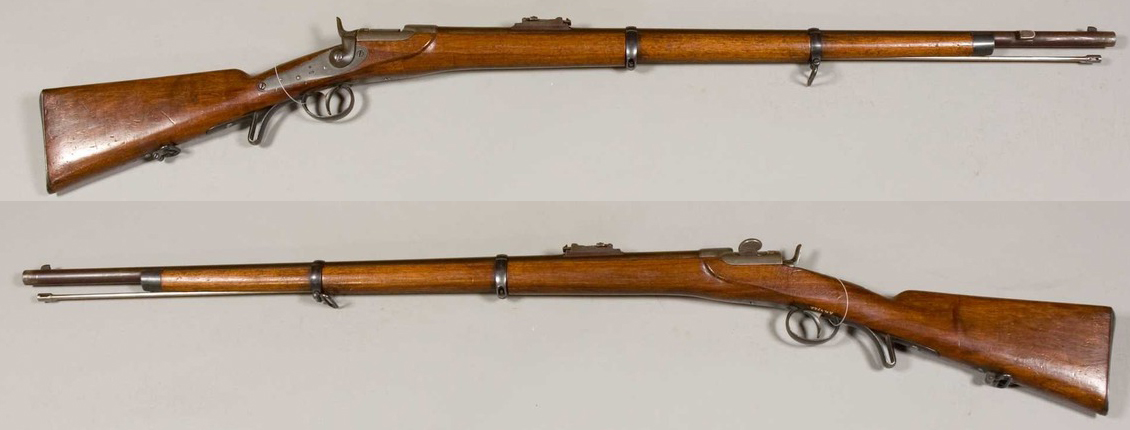 Puška Werndl M1867.